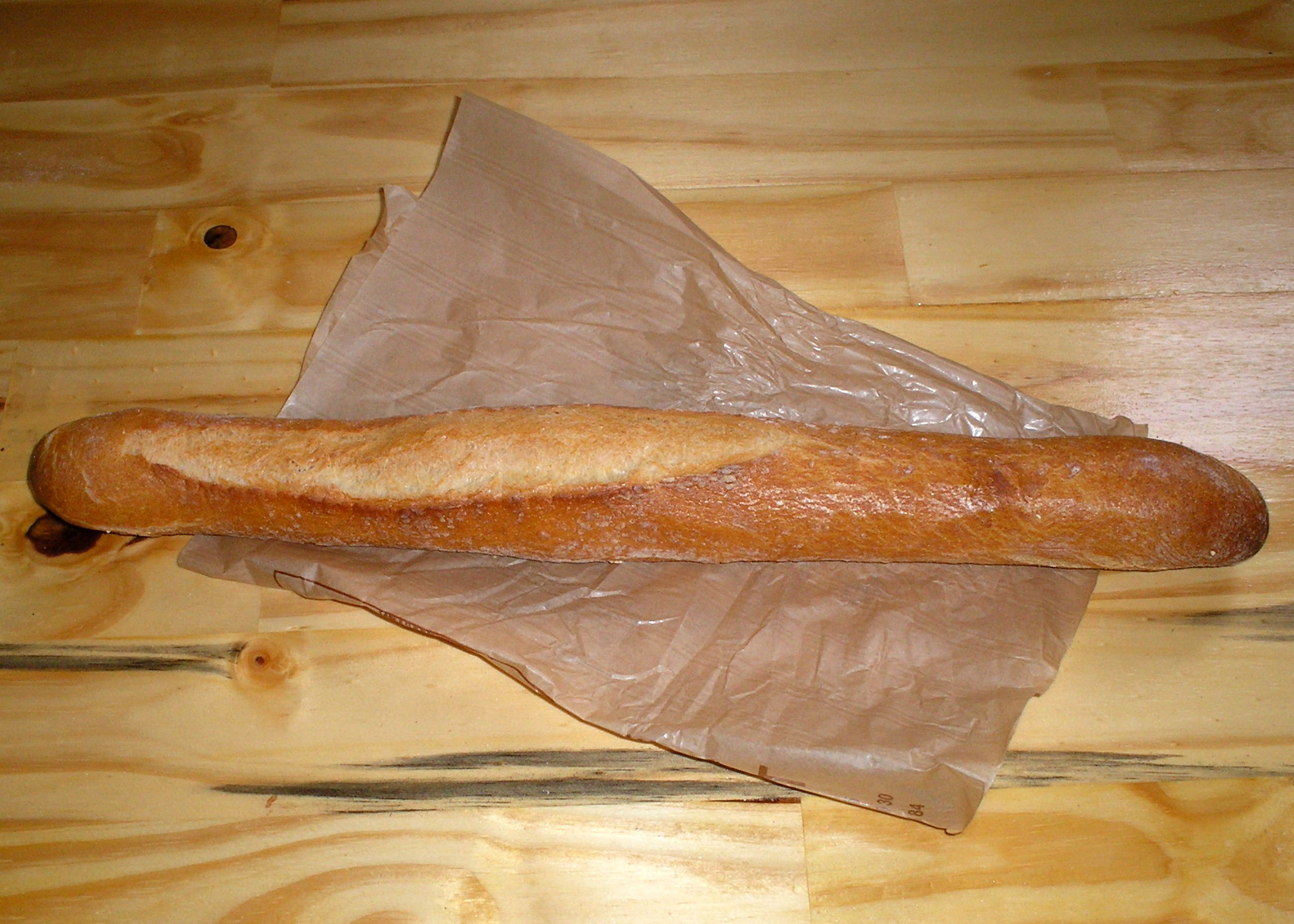 Photo d'une ficelle (pain français)